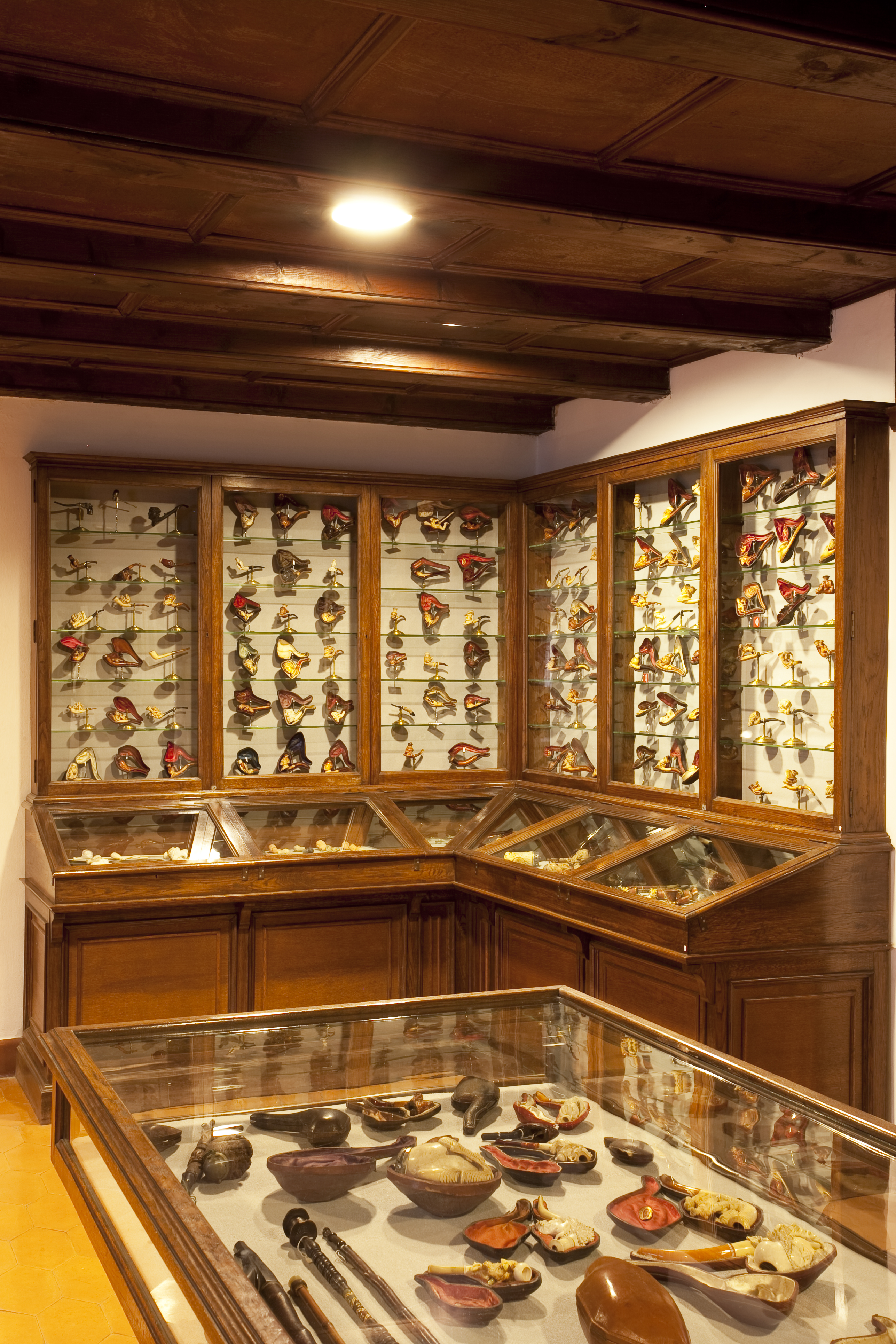 Sala fumador Gabinet col·leccionista - Fot. GUILLEM F-H.jpg